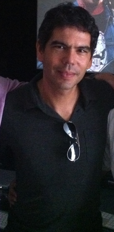 Guitarrista Dado Villa-Lobos.